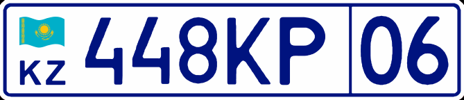 Автомобильный номер полиции Казахстана, стандарт 2012 года